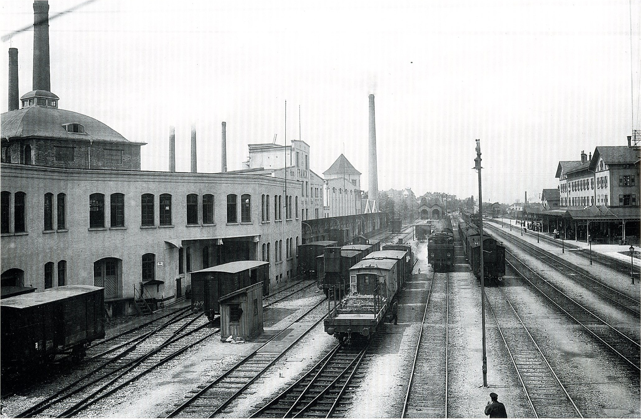 Gleisanlagen in Ludwigsburg im Jahr 1910. Blickrichtung Norden.